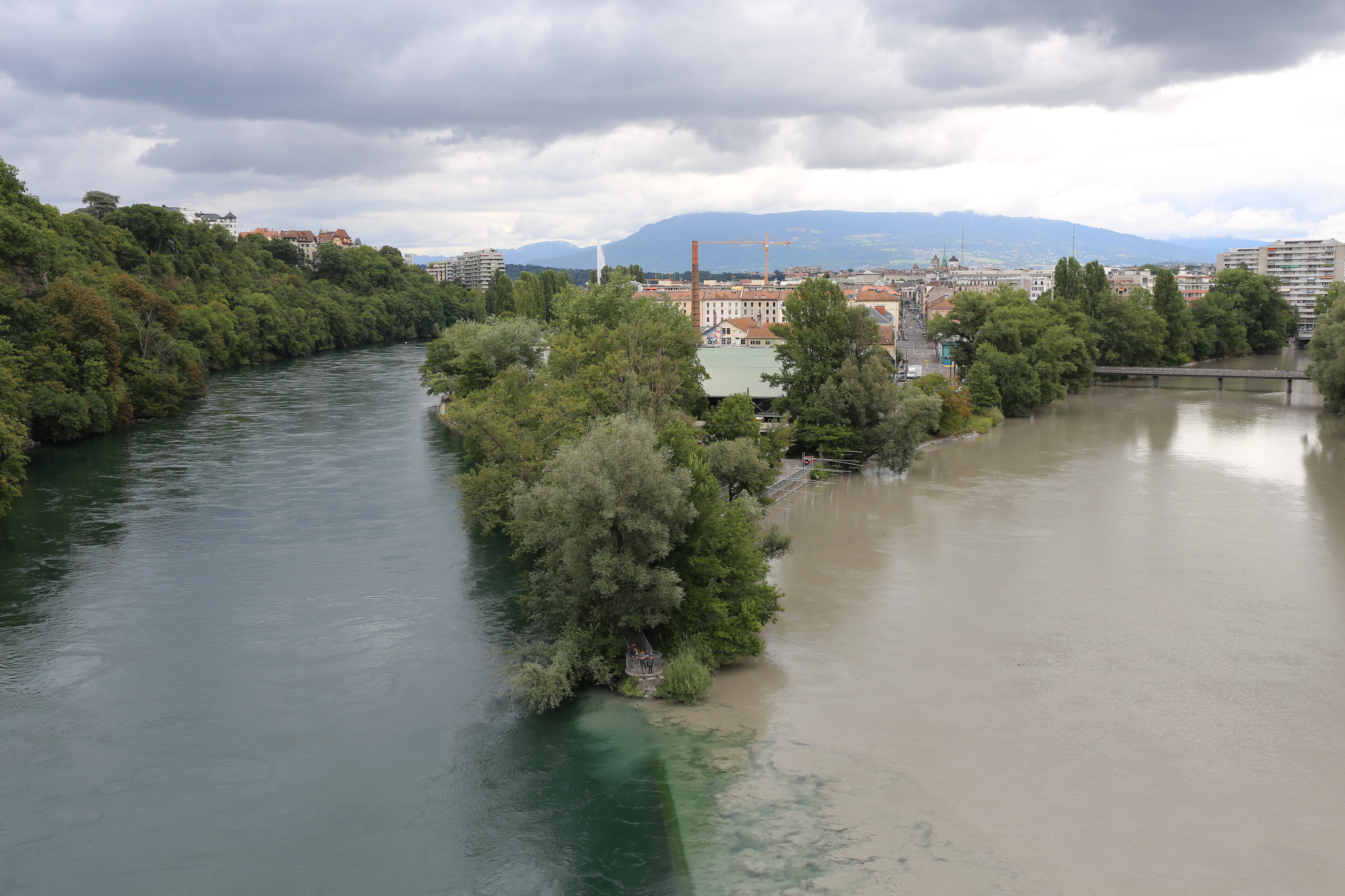 Confluence entre le Rhône (à gauche) et l'Arve (à droite) à Genève, vue du pont ferroviaire.